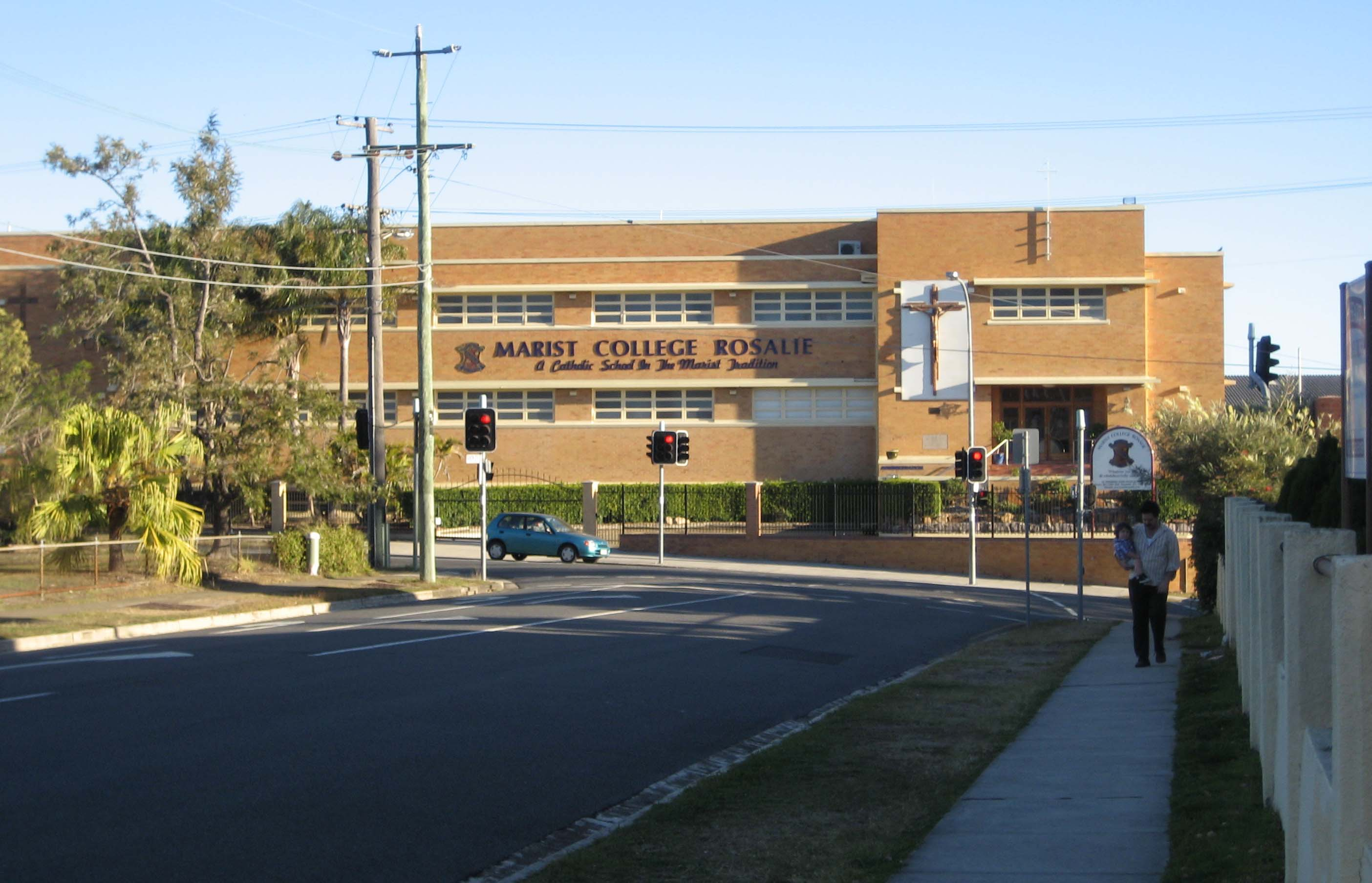 Marist College Rosalie